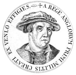 Afbeeldingen van een munt met zijn zelfportret gemaakt door Michael Mercator (1491-1544), afbeelding gepubliceerd in 1850